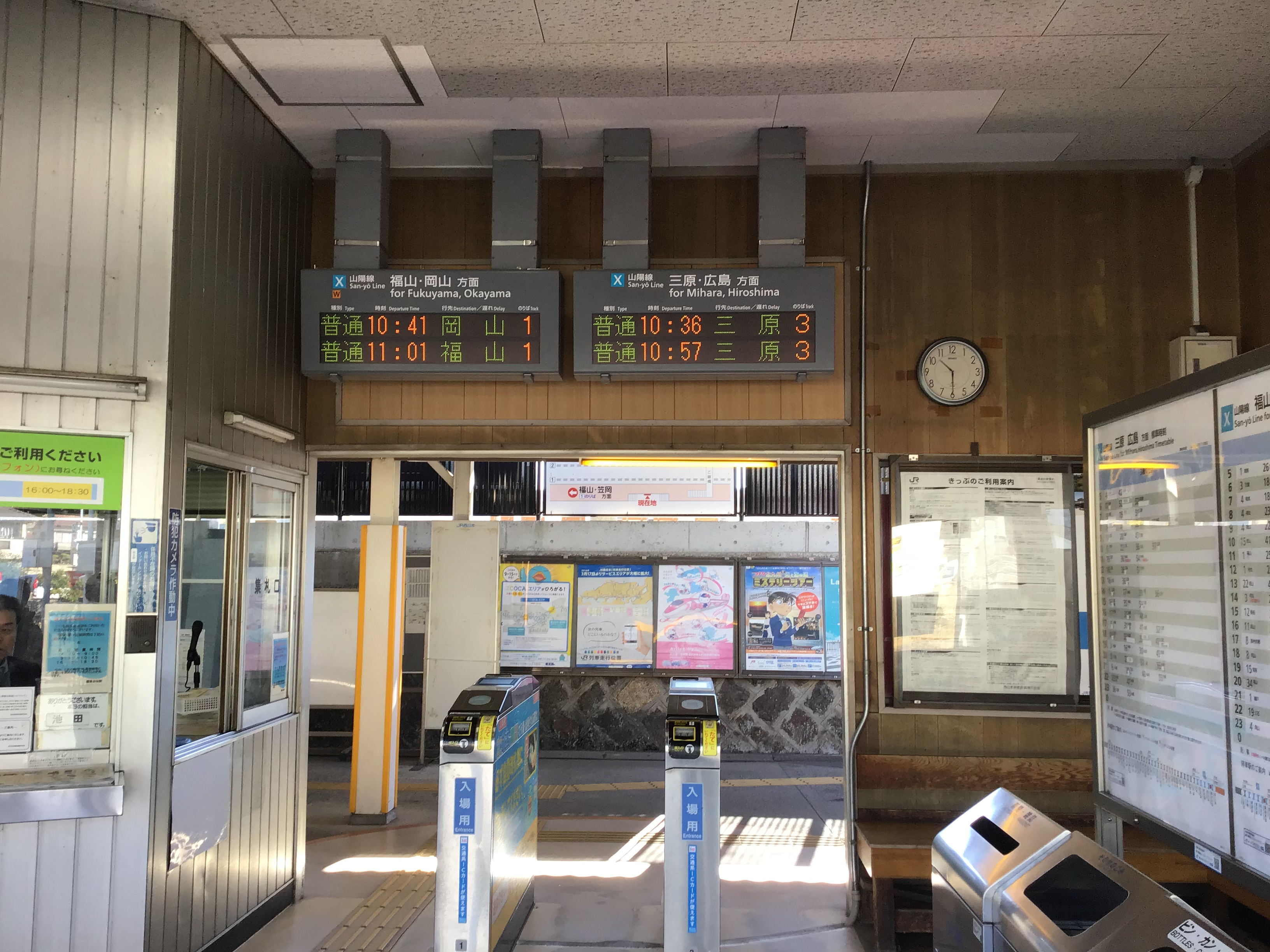 備後赤坂駅内で撮影。